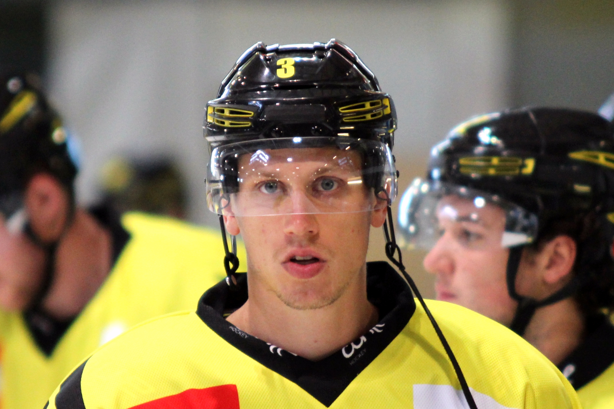 Kyle Sonnenburg (K 34).